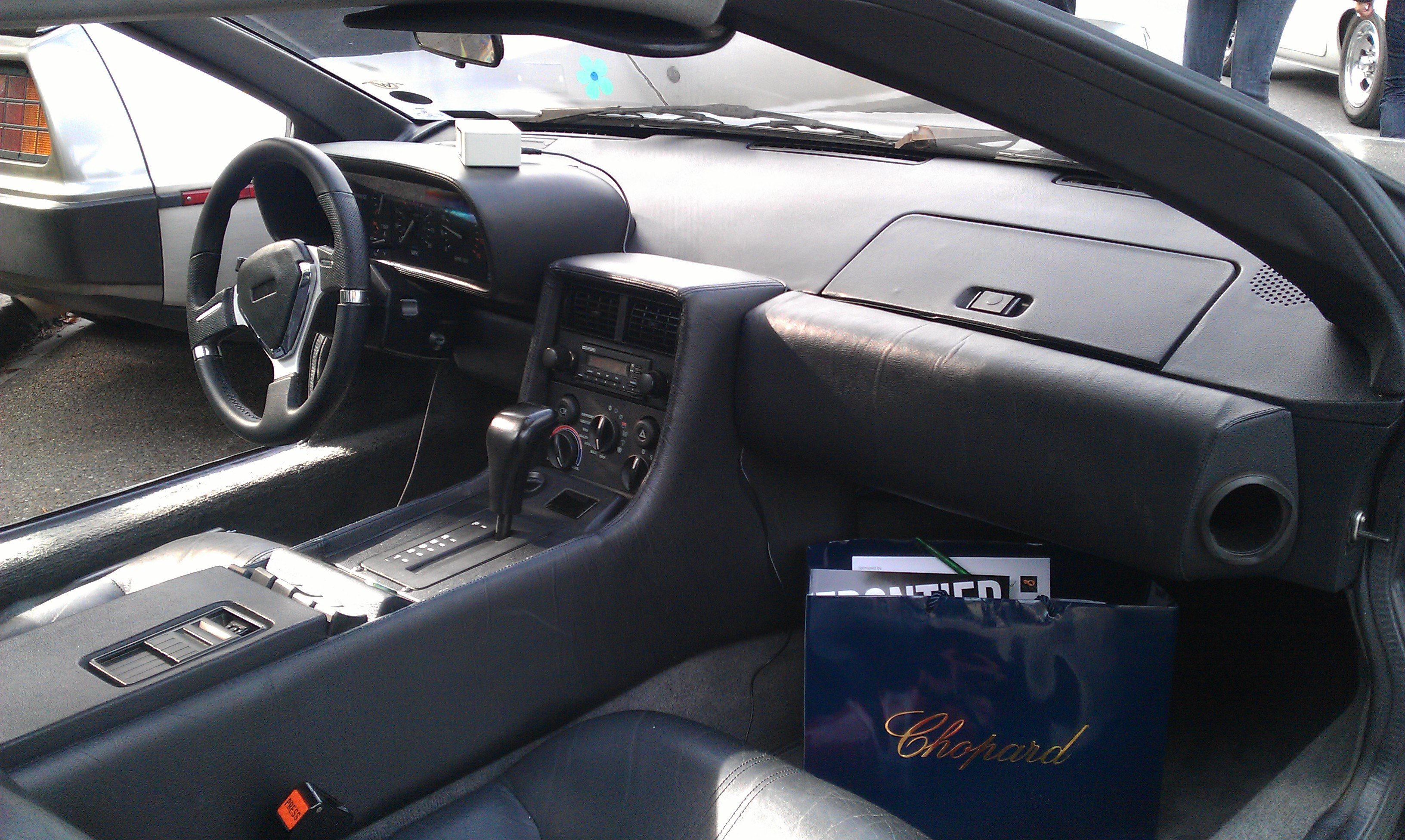 De Lorean DMC-12